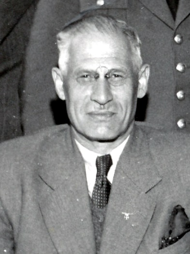 Thorstein Fretheim. RA/PA-0739/U/0002 1055